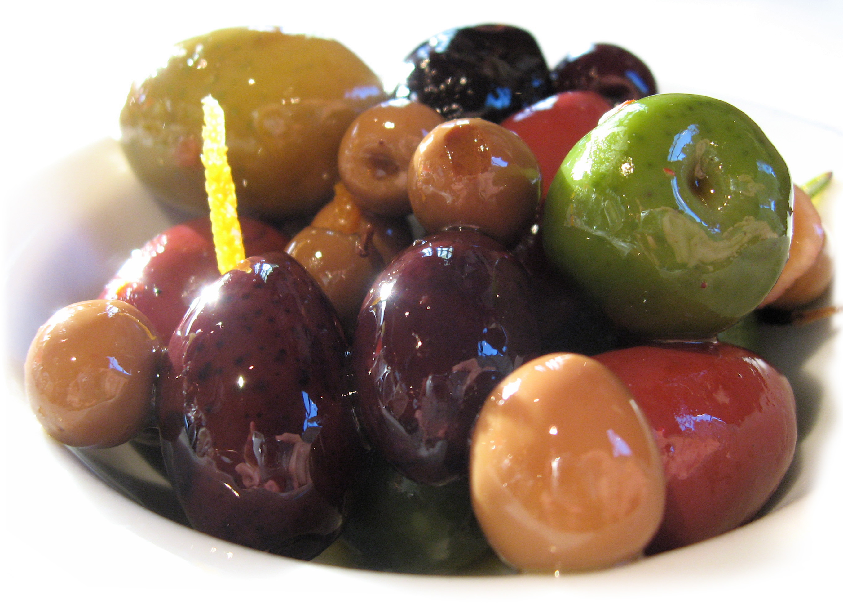 I love olives, but I just starting noticing this in the past couple years. I used to think of them as tasteless salt rings, the parsley of pizza. But now, I am amazed at their variety of sizes, tastes and colors. Without a scale reference, this could be a lubricated still life with green apple, eggplant and mango.